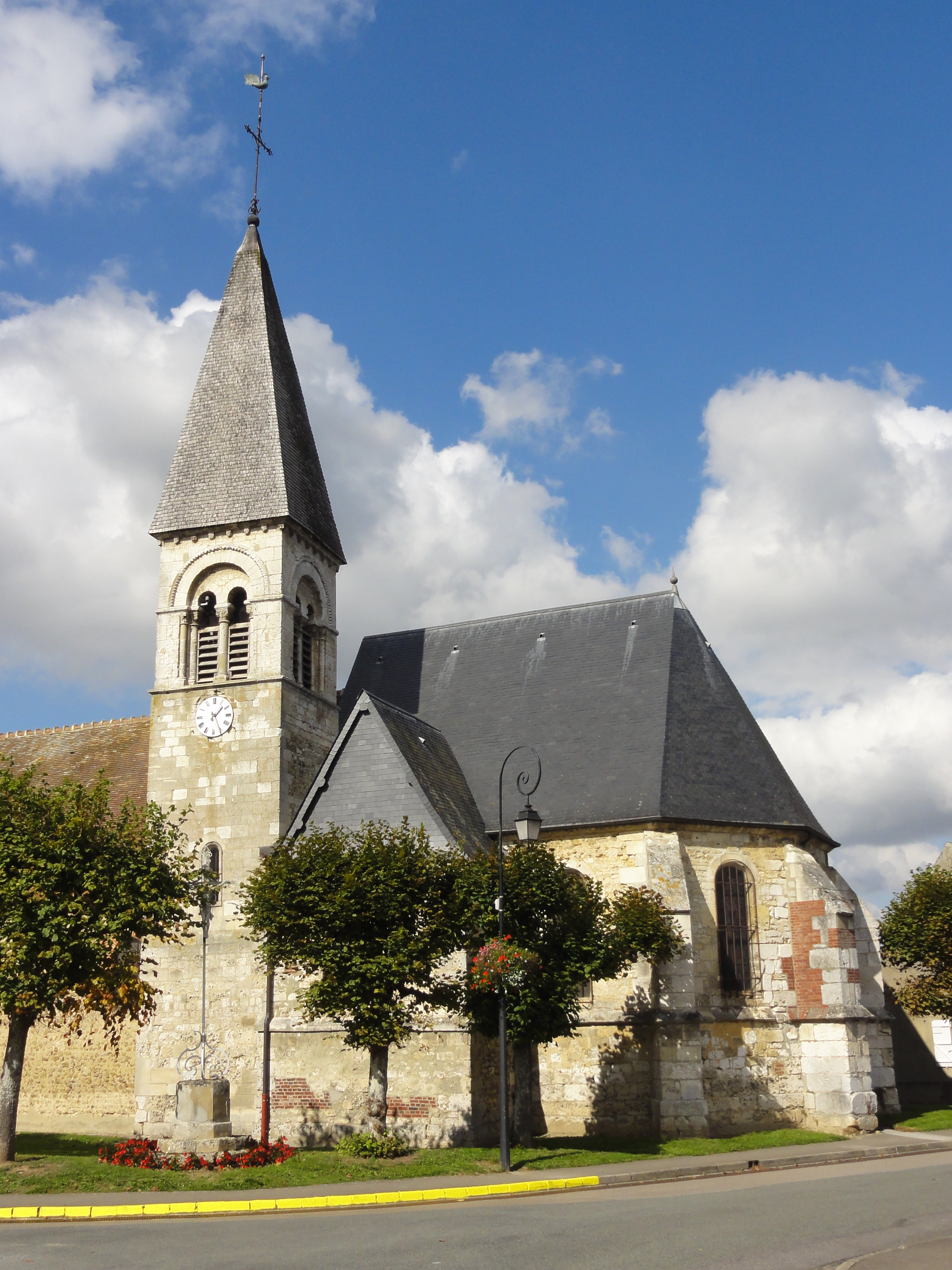 Église Saint-Lucien de Warluis - voir titre.